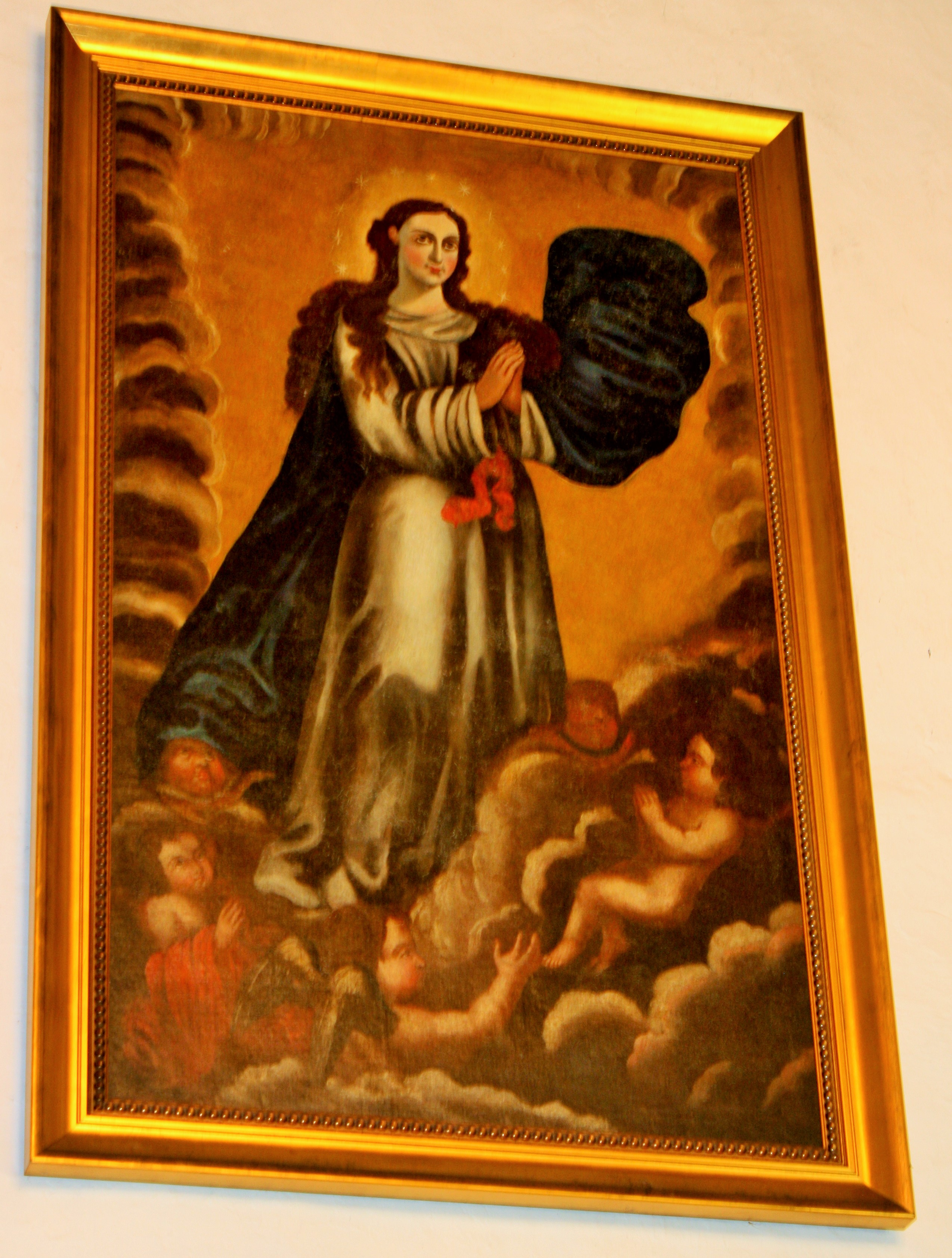 Inmaculada Concepción copia realizada de la existente en la Catedral de Sevilla realizada por Murillo.